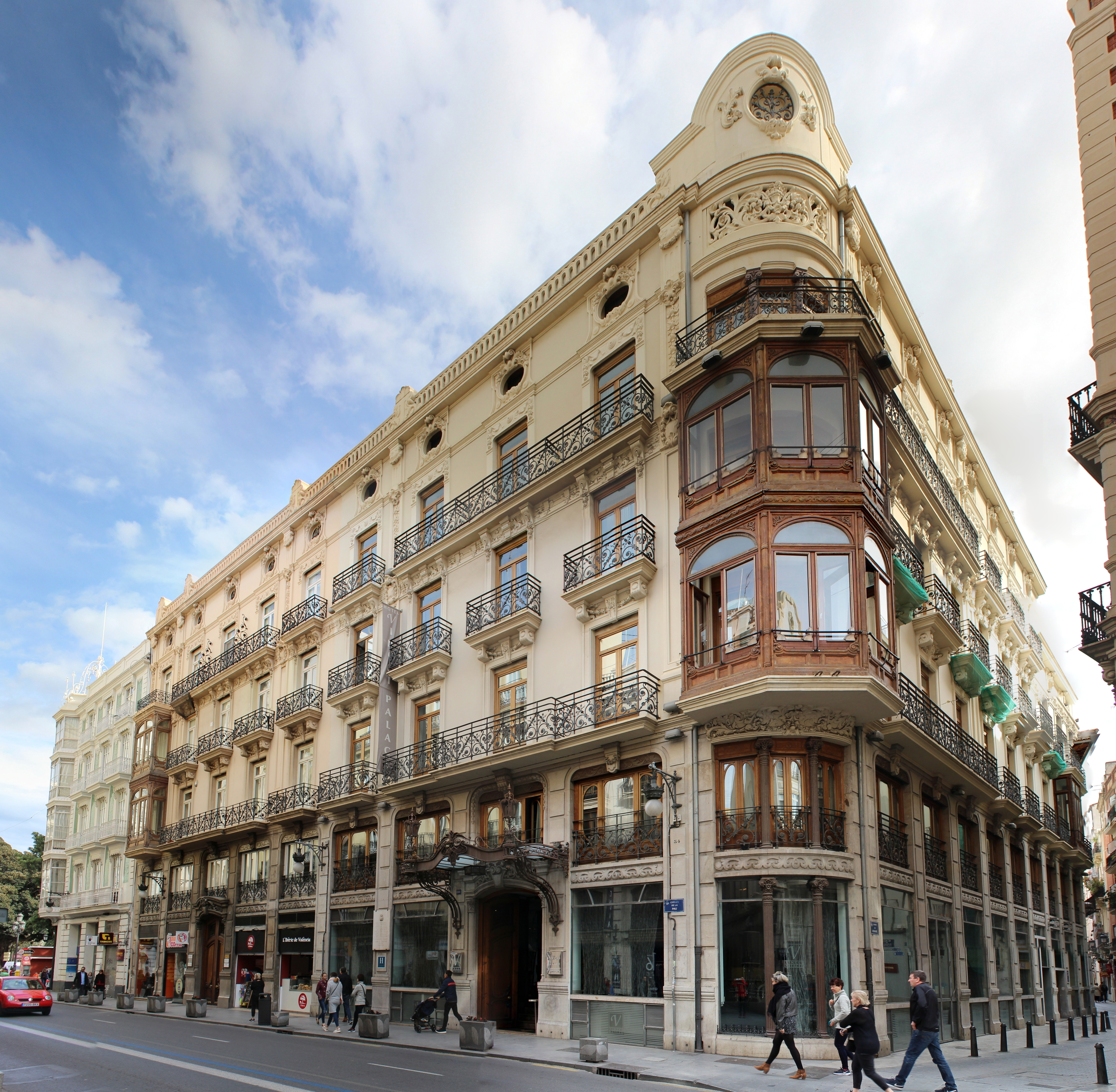 Edificio Trenor de Antonio Martorell Trilles (1906) en Valencia